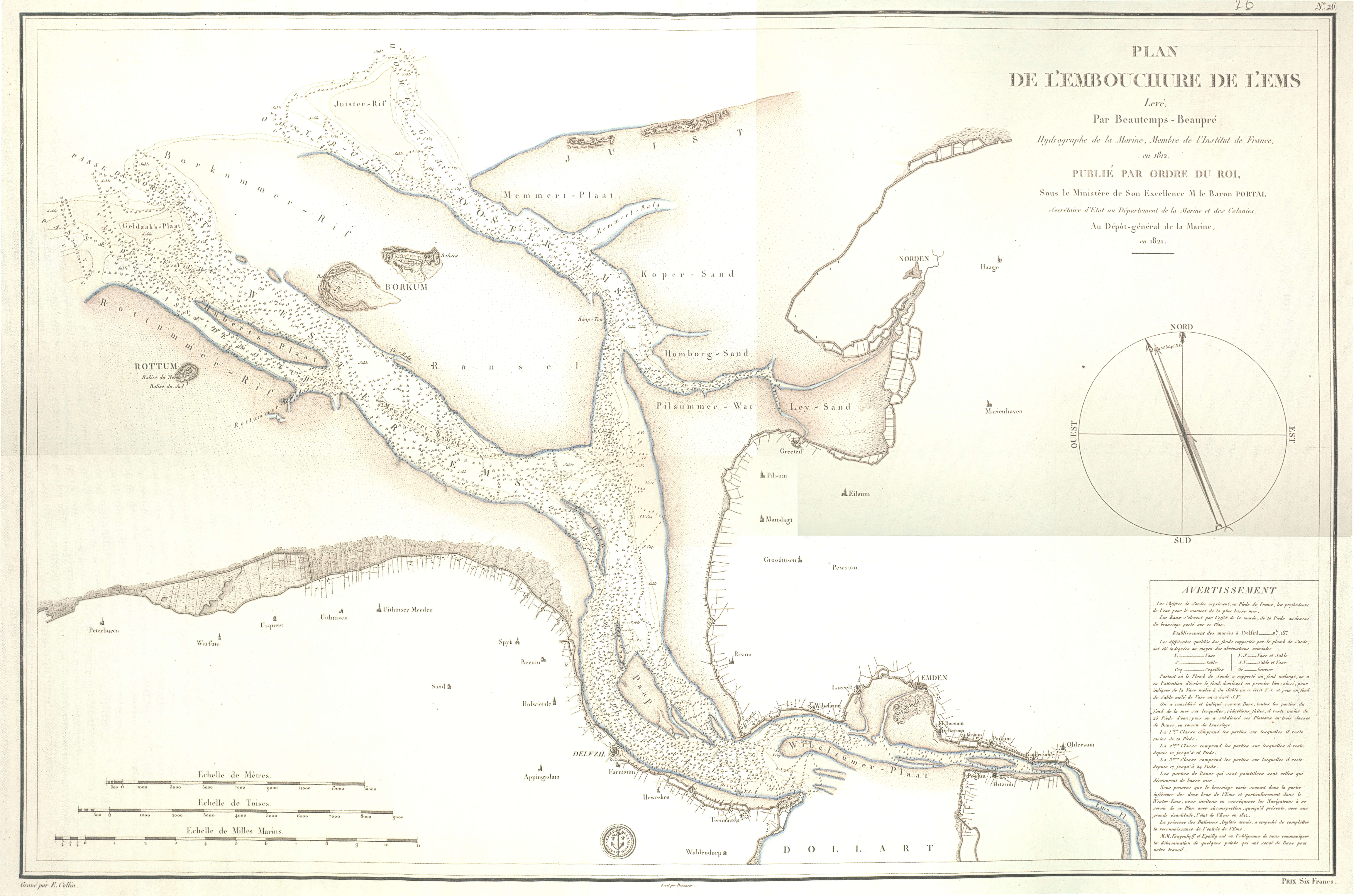 Plan de L' EMBOUCHURE DE L 'EMS